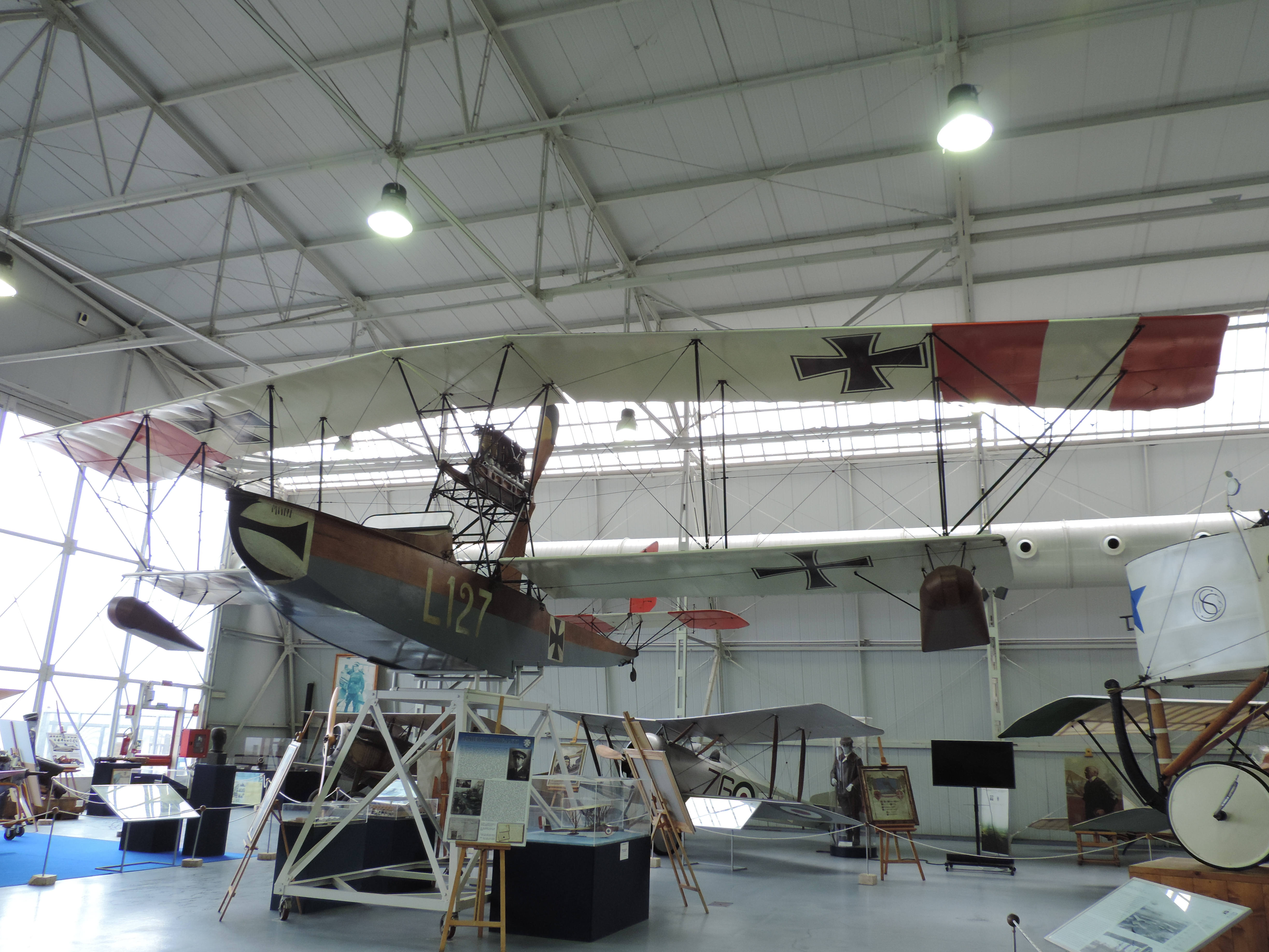 Lohner L im Luftwaffenmuseum Vigna di Valle